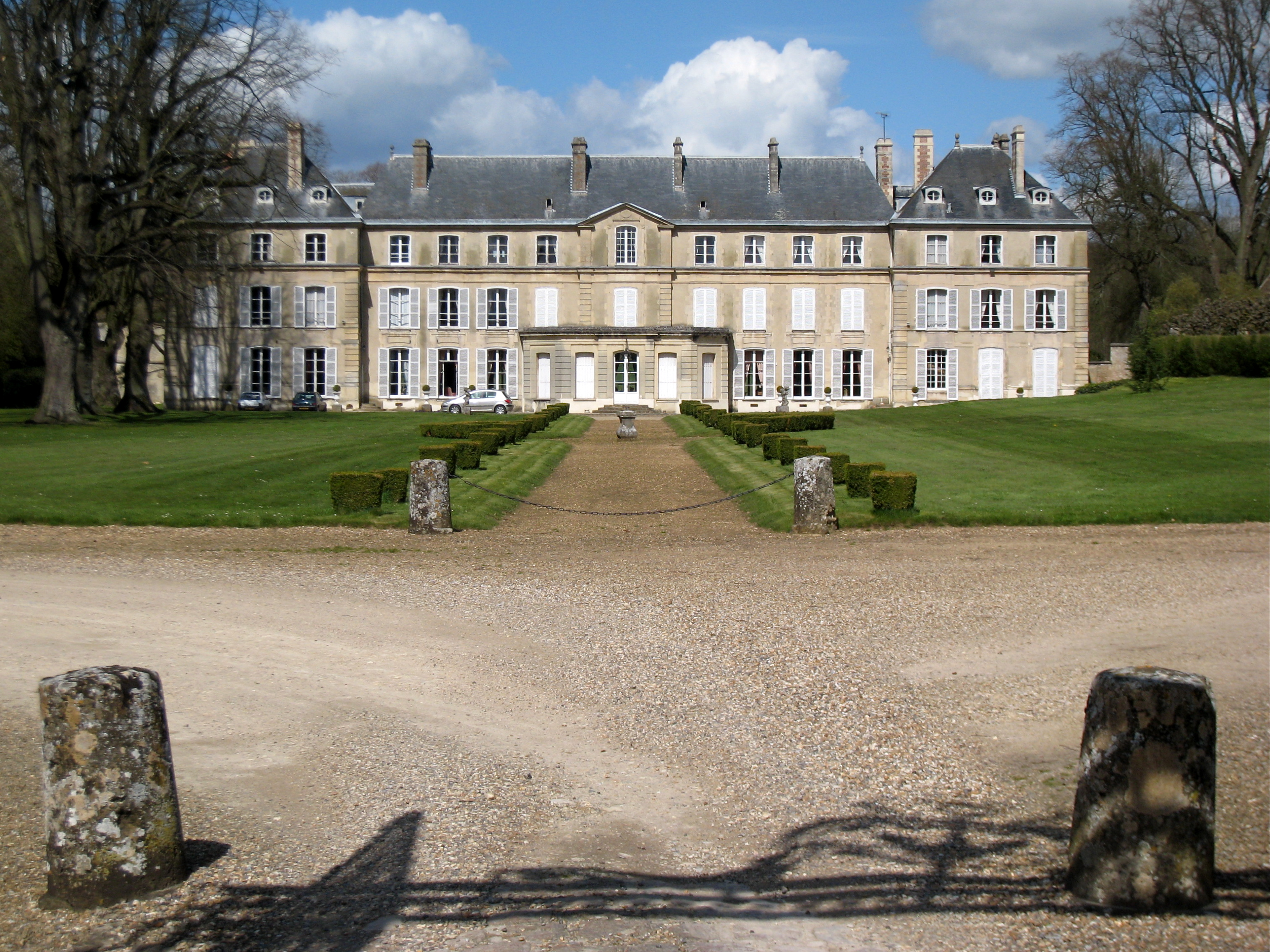 Chateau de Boulleaume, commune de Lierville, Oise, France